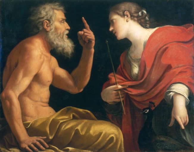 ? × ? cm